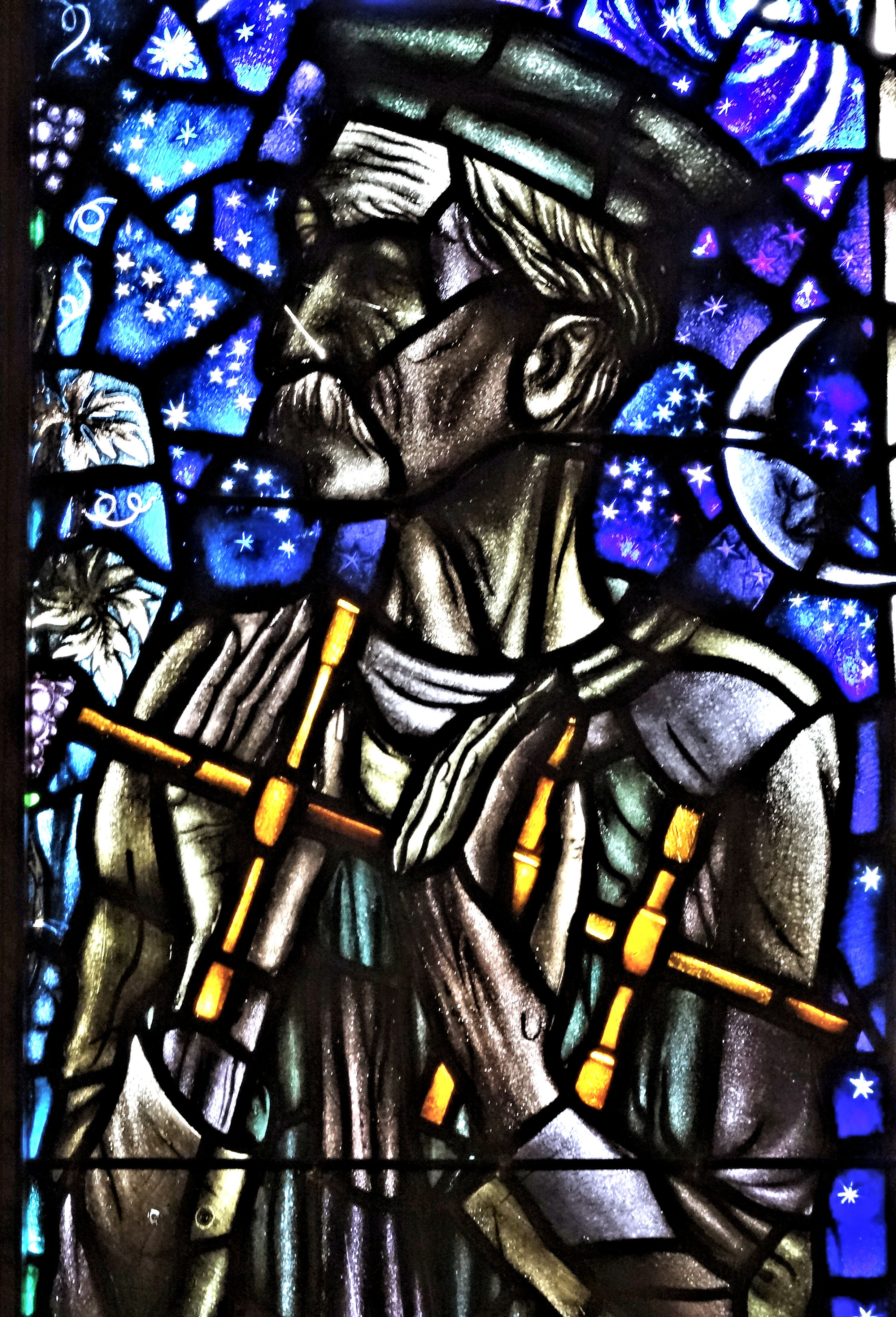 Detail raam V De moderne tijd. De vijf gedenkramen in de aula van het Academiegebouw in Groningen werden tussen 1937 en 1951 gemaakt door de kunstenaar Johan Dijkstra.